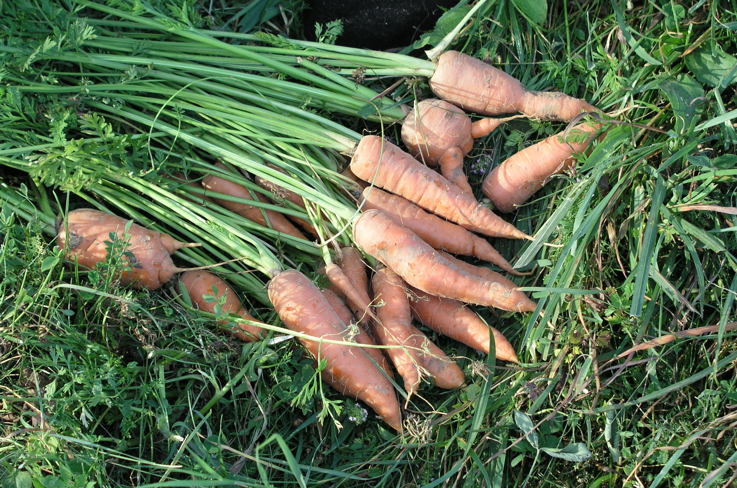 Svježe ubrana mrkva